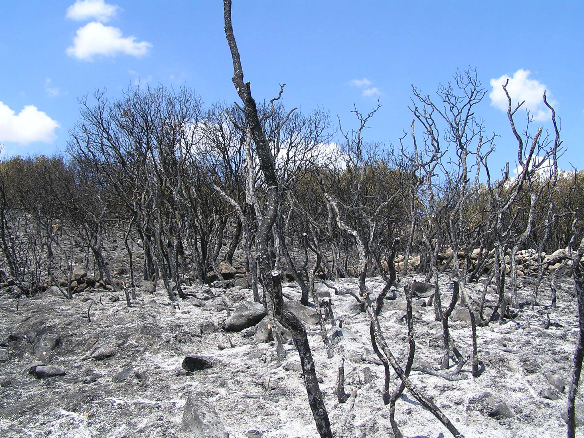 Desolador paisatge després d'un incendi, a Alcalá la Real, Jaén, Espanya.